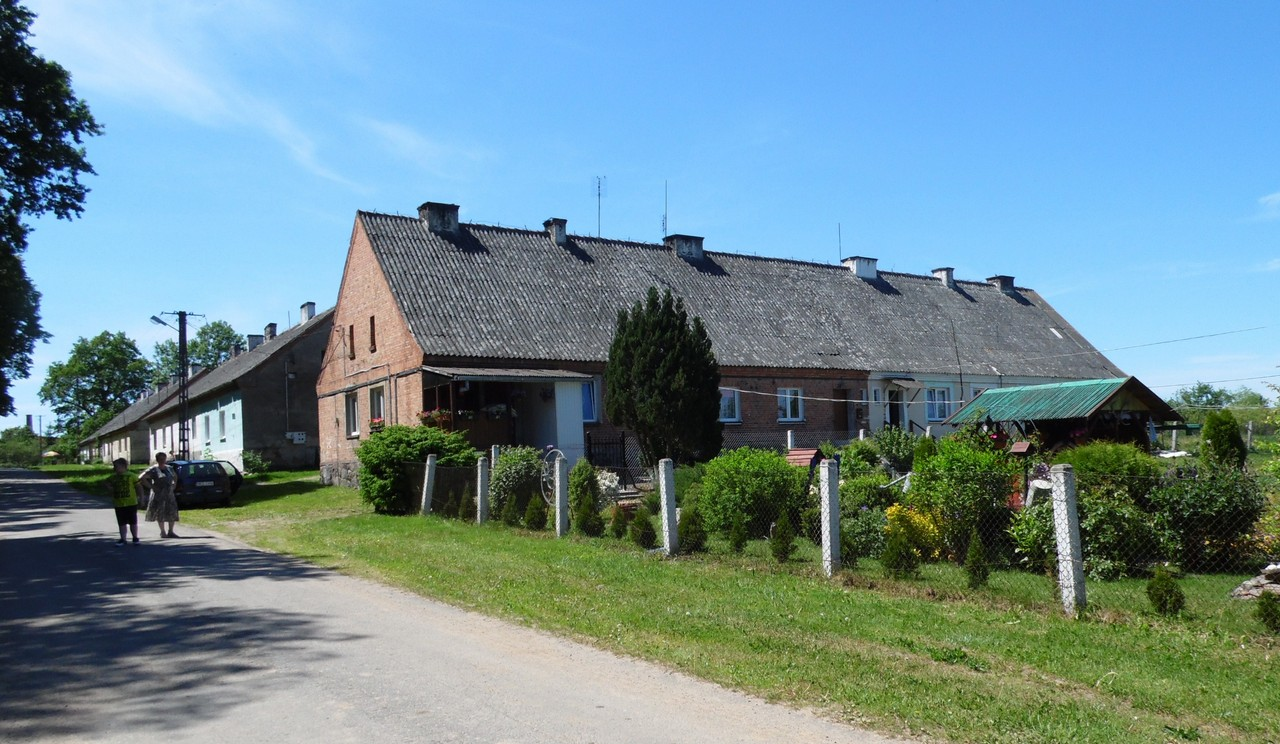 WIDOK NA KAŁKI OD STRONY BRZEŹNICY.